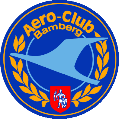 Vereinslogo des Aero-Clubs Bamberg. Der Kranich ist dem Logo des Deutschen Aero-Clubs entlehnt, das Wappen ist das der Stadt Bamberg.